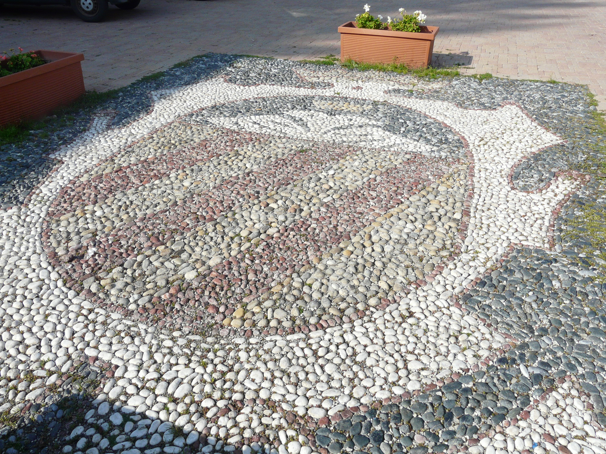 Stemma in ciottolato di Calizzano, Liguria, Italia